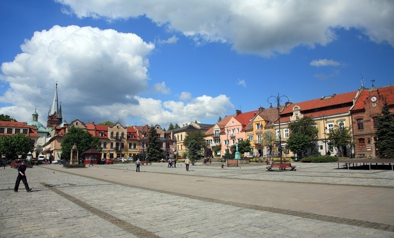 Myślenice (województwo małopolskie)